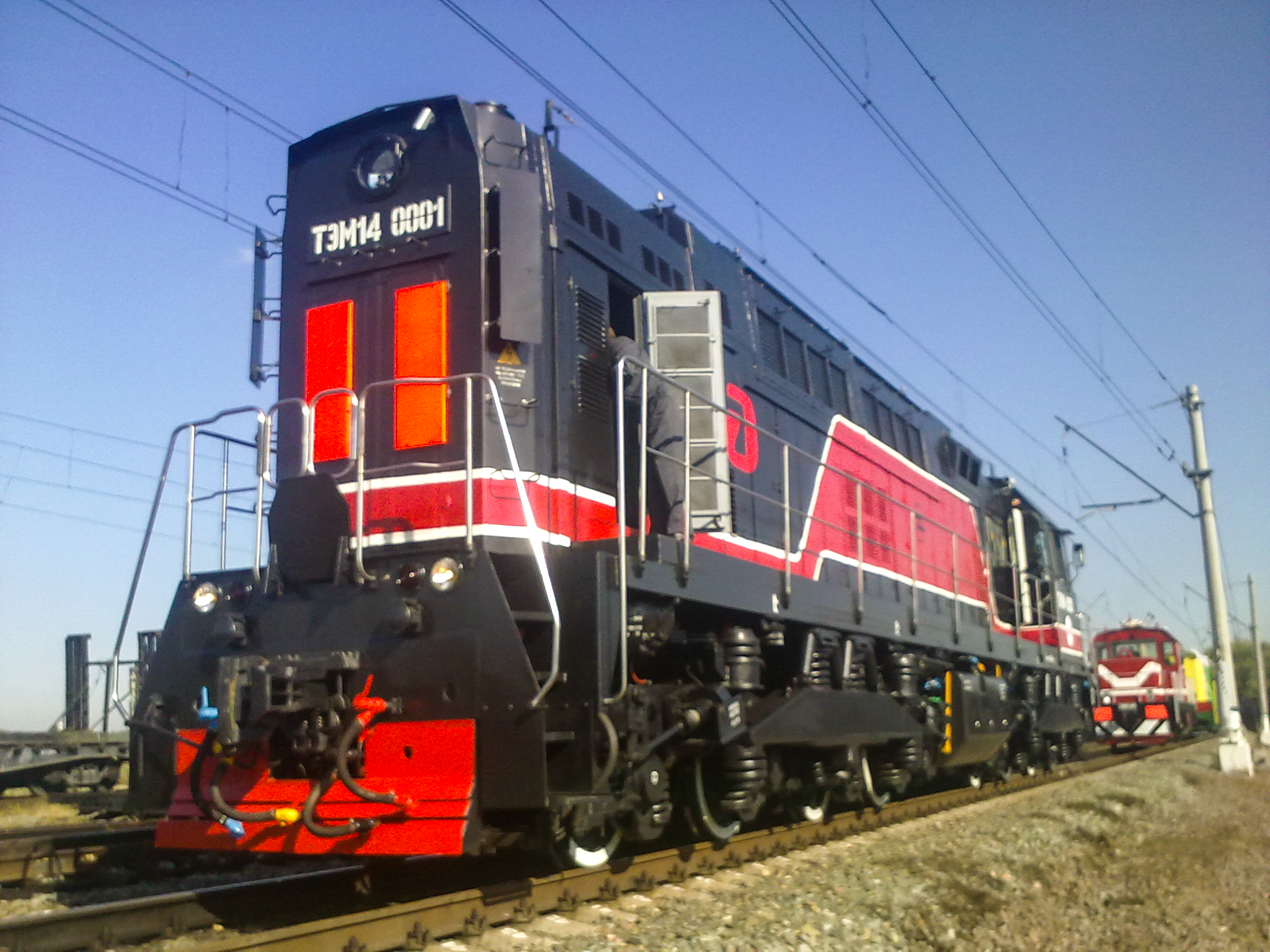 Тепловоз ТЭМ14-0001 на выставке Экспо-1520 в 2011 году на кольце ВНИИЖТ в Щербинке